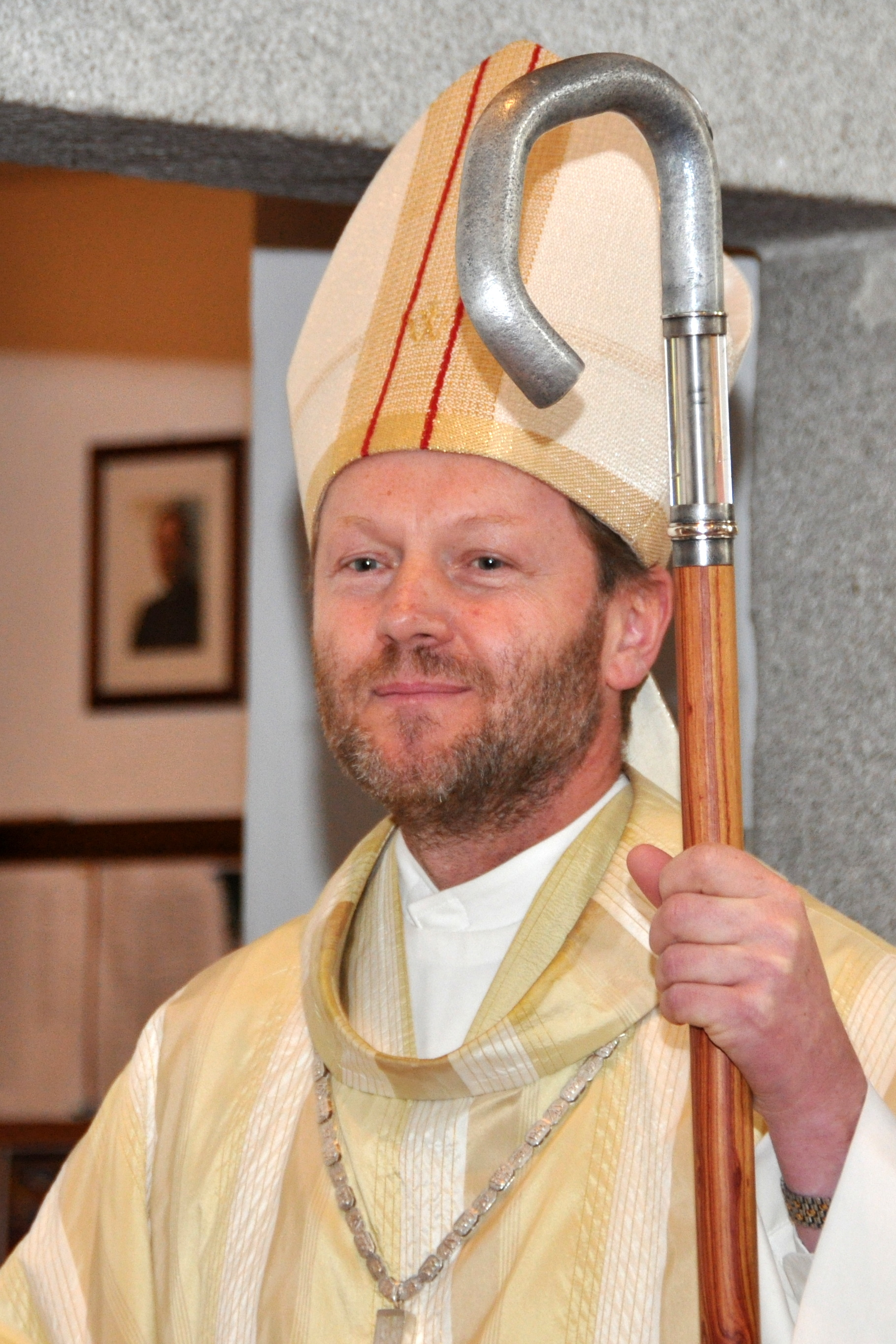 Reinhold Dessl spendet die heilige Firmung in St. Gotthard am 21. Juni 2015